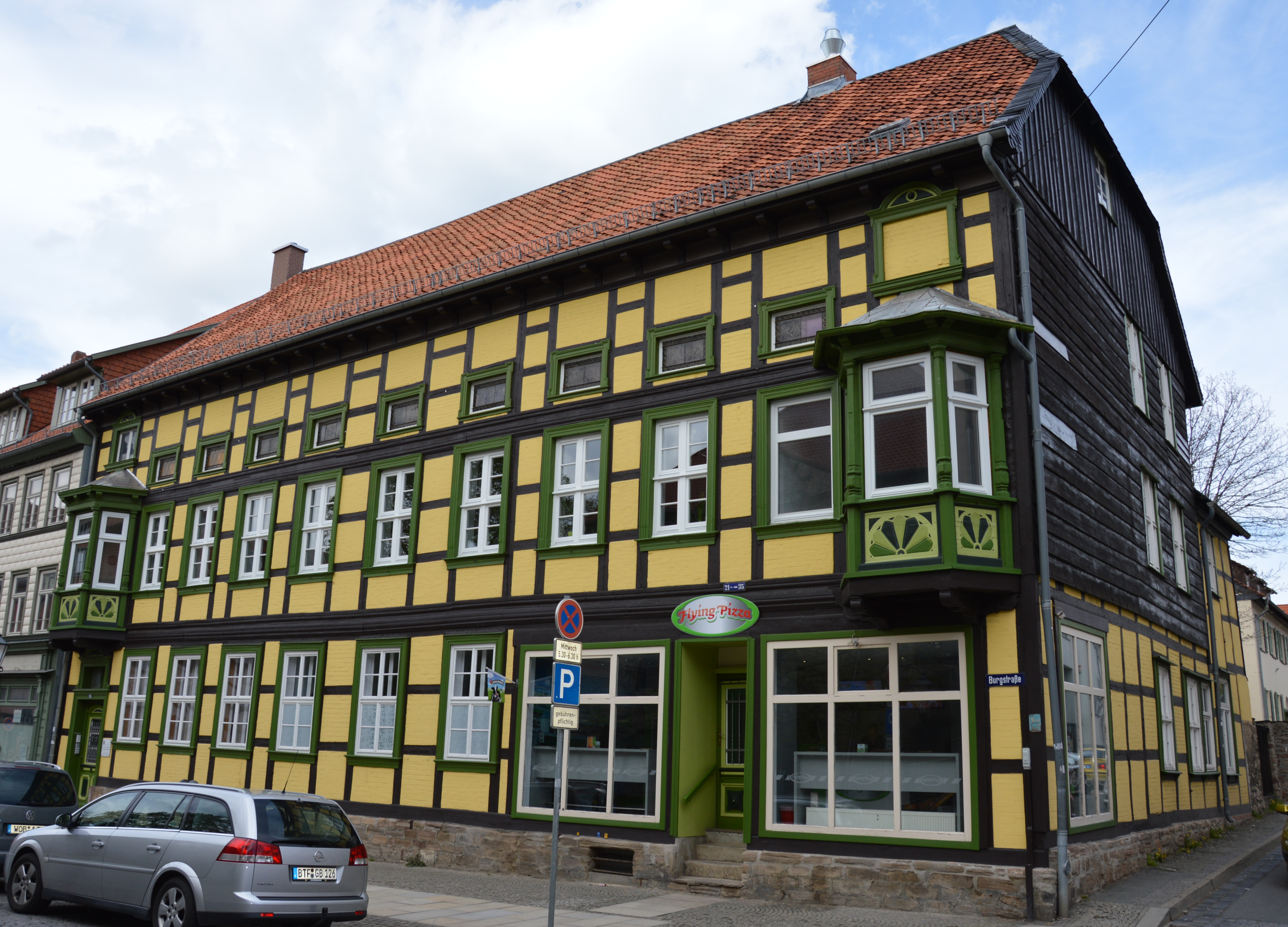 Haus Burgstraße 35 in Wernigerode